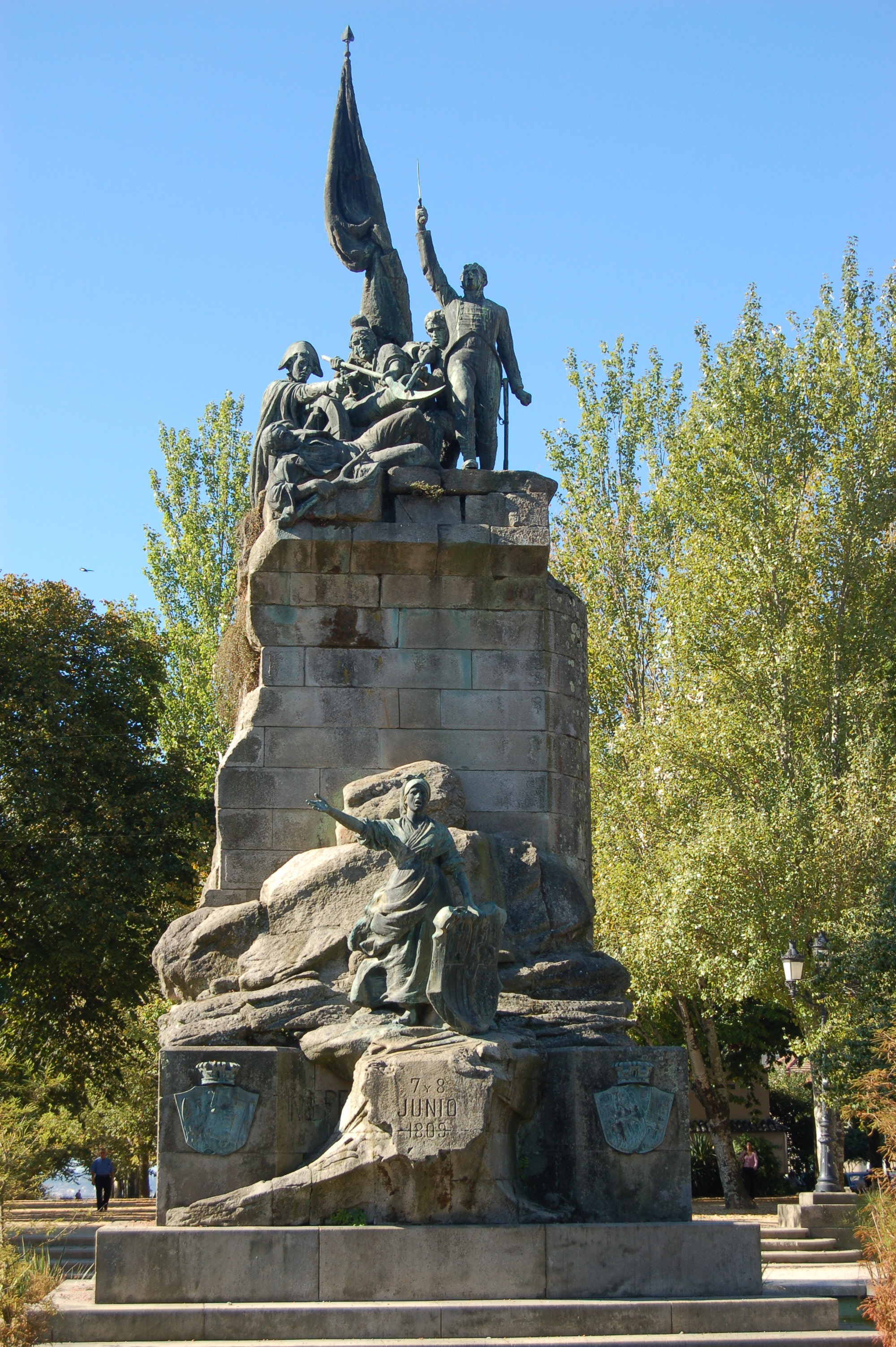 Monumento aos Heroes de Ponte Sampaio en Pontevedra